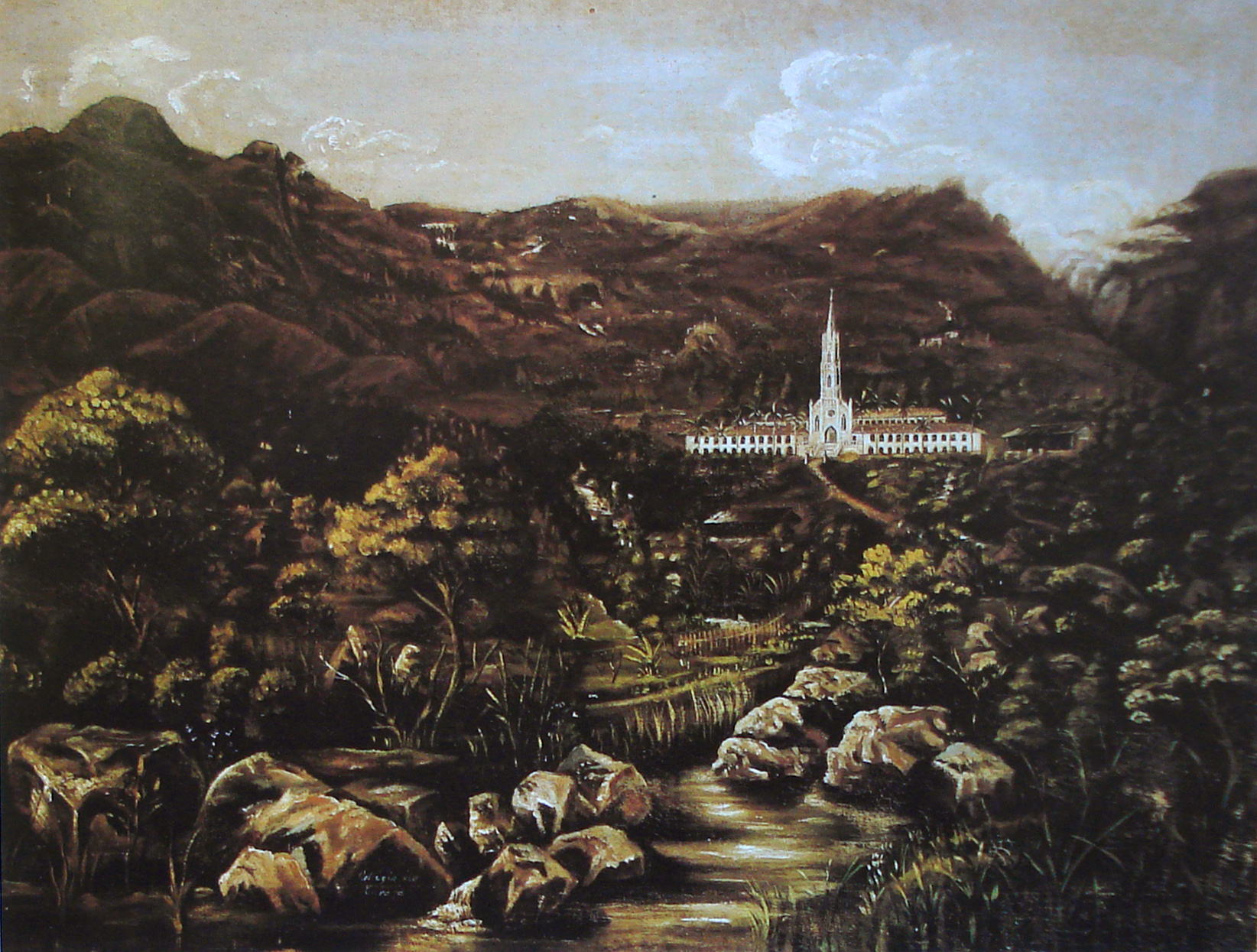 Vista do Colégio do Caraça, óleo sobre tela